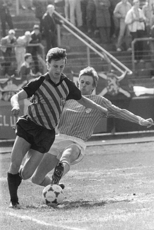 ADN-ZB-Uhlemann-17.4.87-zin- Berlin: Fußball-Oberliga BFC Dynamo - FC Carl Zeiss Jena 3:1 (1:0)- Der Schütze des zweiten Berliner Tores, Andreas Thom (l.), kann sich mit schnellem Antritt gegen den Gästeverteidiger Mario Röser durchsetzen. Vor 10 000 Zuscahuern behauptete Titelverteidiger BFC Dynamo mit seinem Erfolg die klare Tabellenführung.